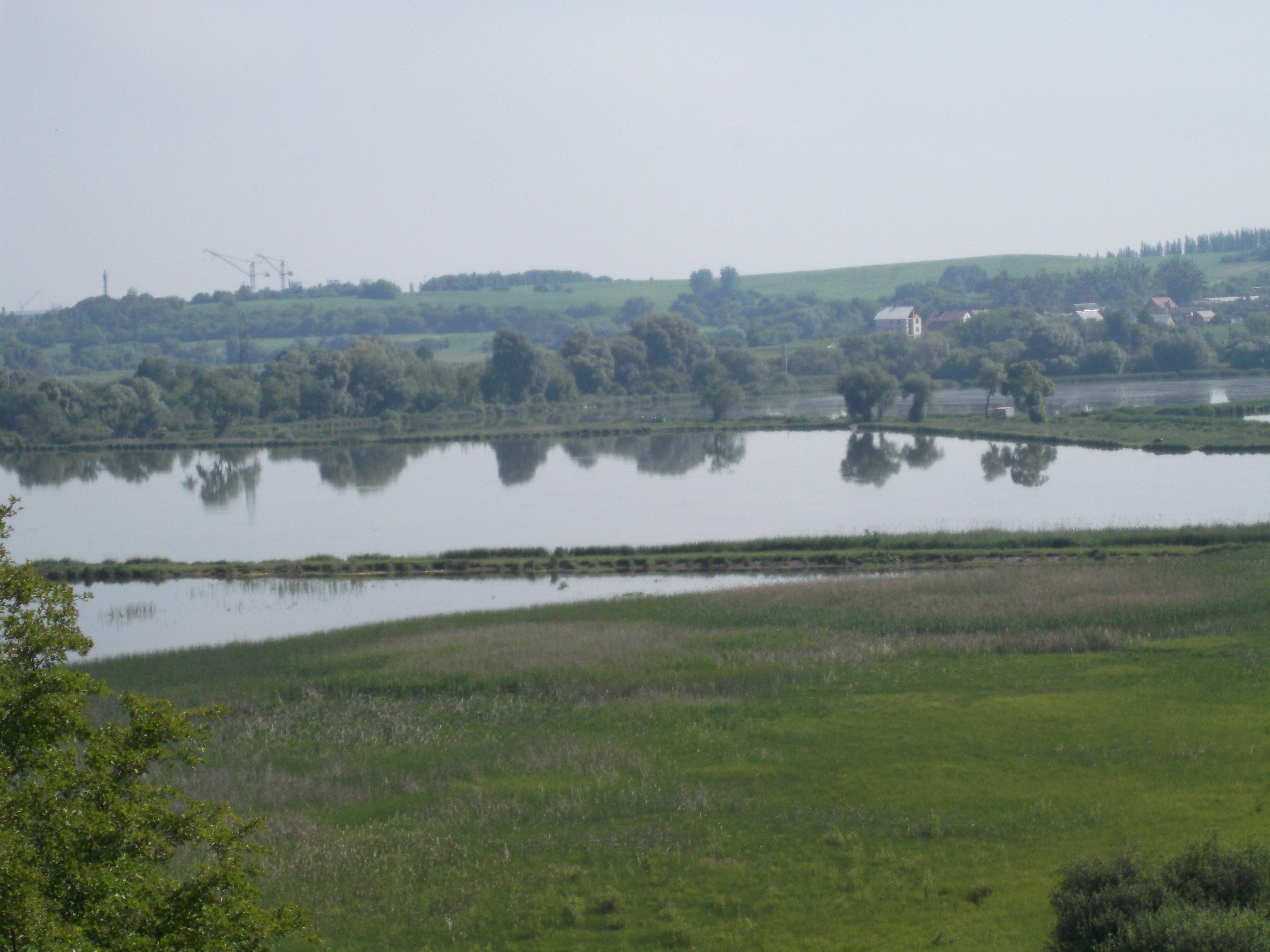 Село Понебель, Рівненський район, Україна. Ставки Понебеля.